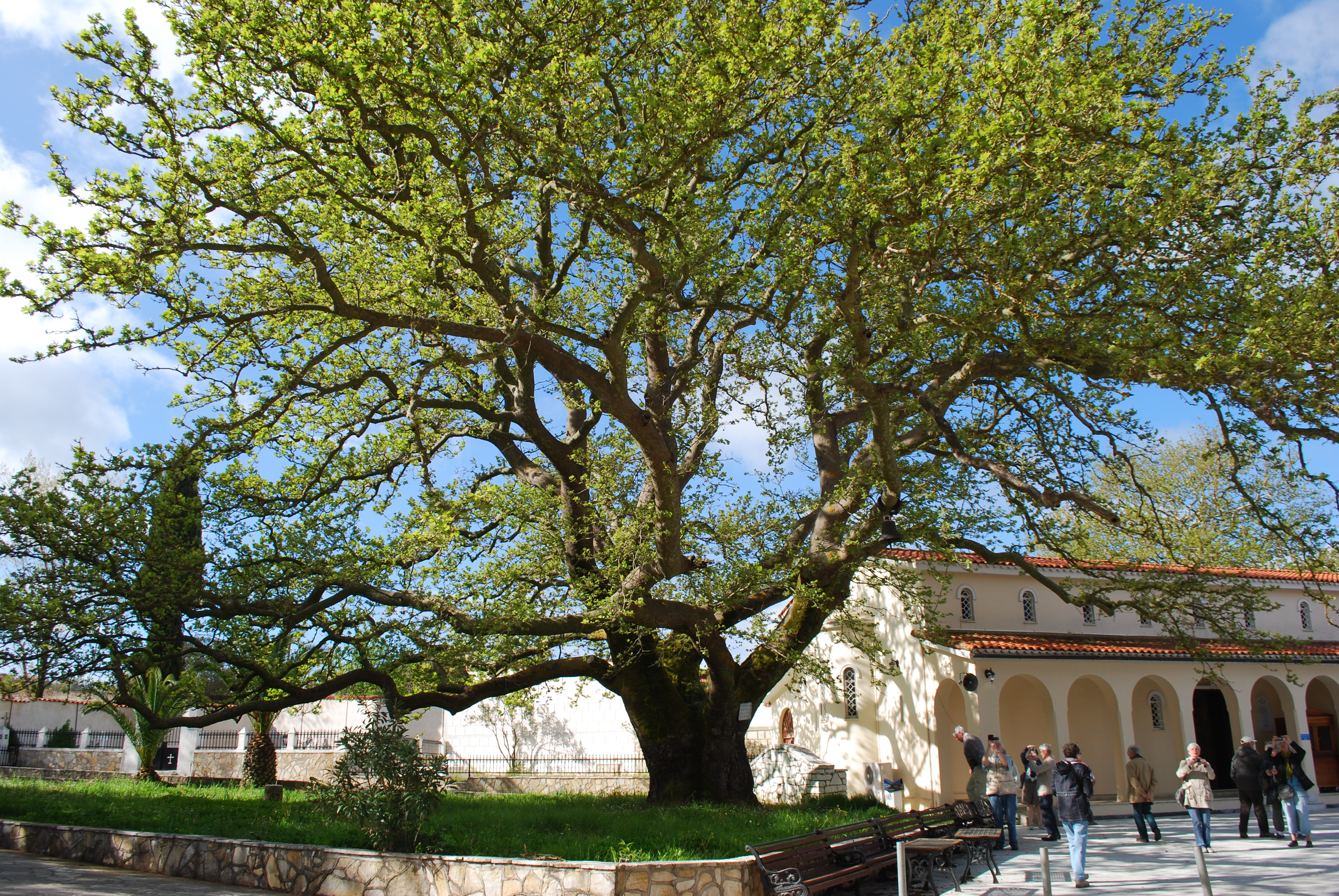 Vue du monastère de Agios Gerasimos à Kephalonia.